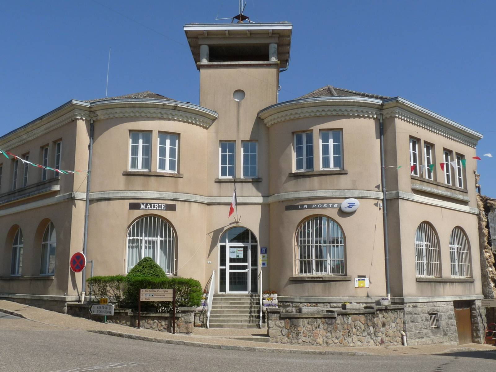 Mairie-poste de Brigueuil, Charente, France